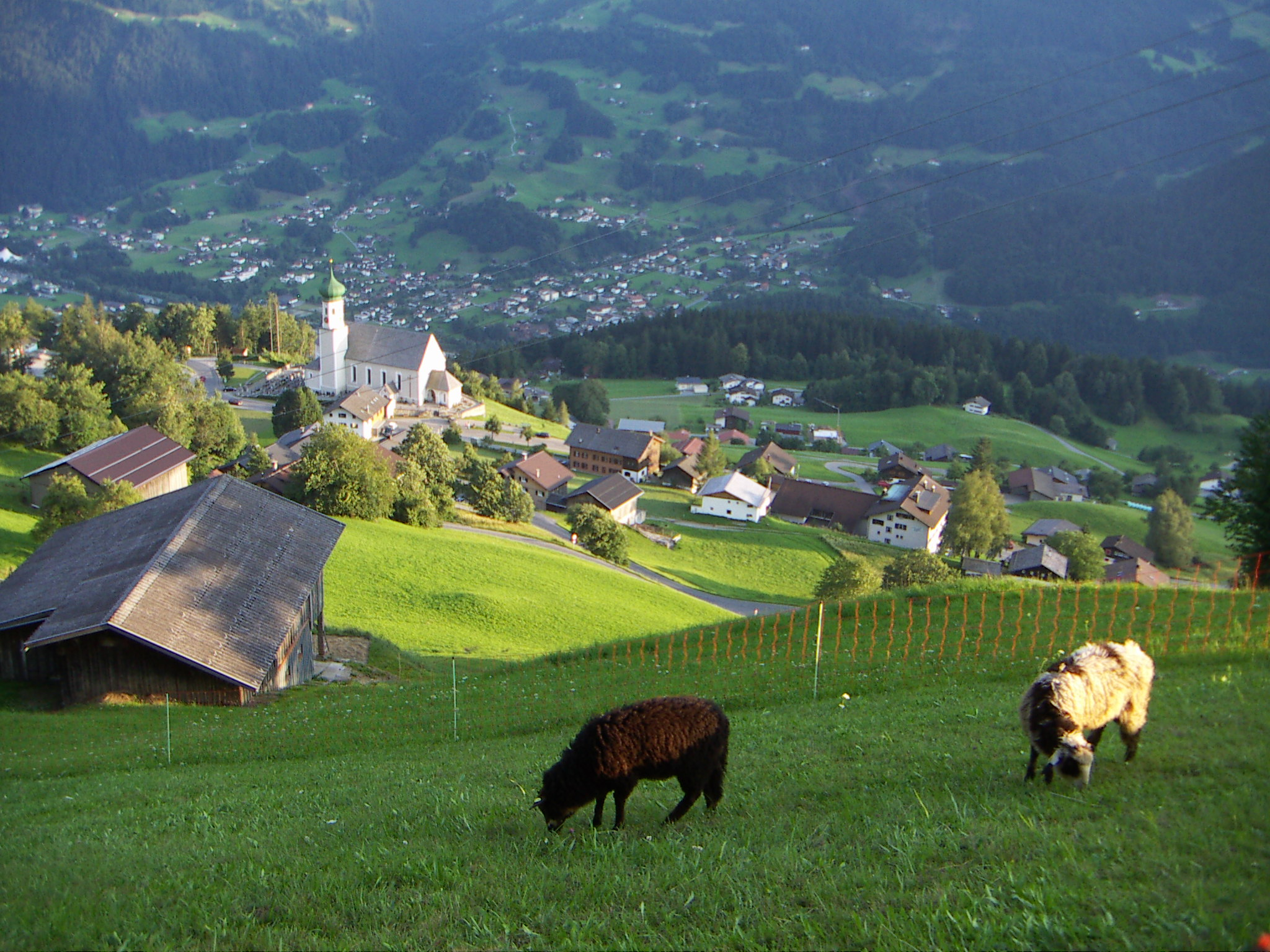 Montafoner Steinschafe, in Bartholomäberg, im Hintergrund St. Bartholomäus Kirche